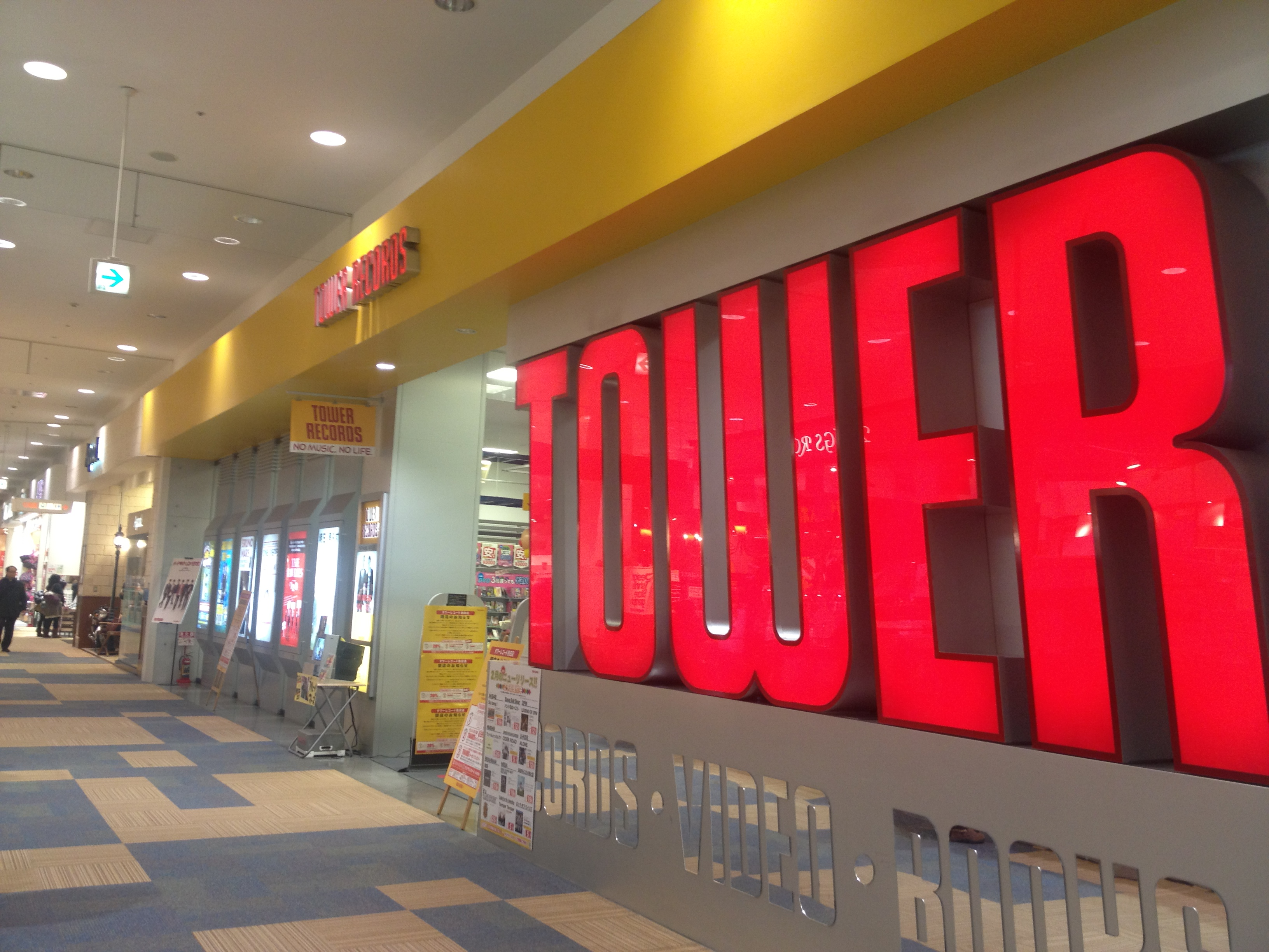 タワーレコード熱田店